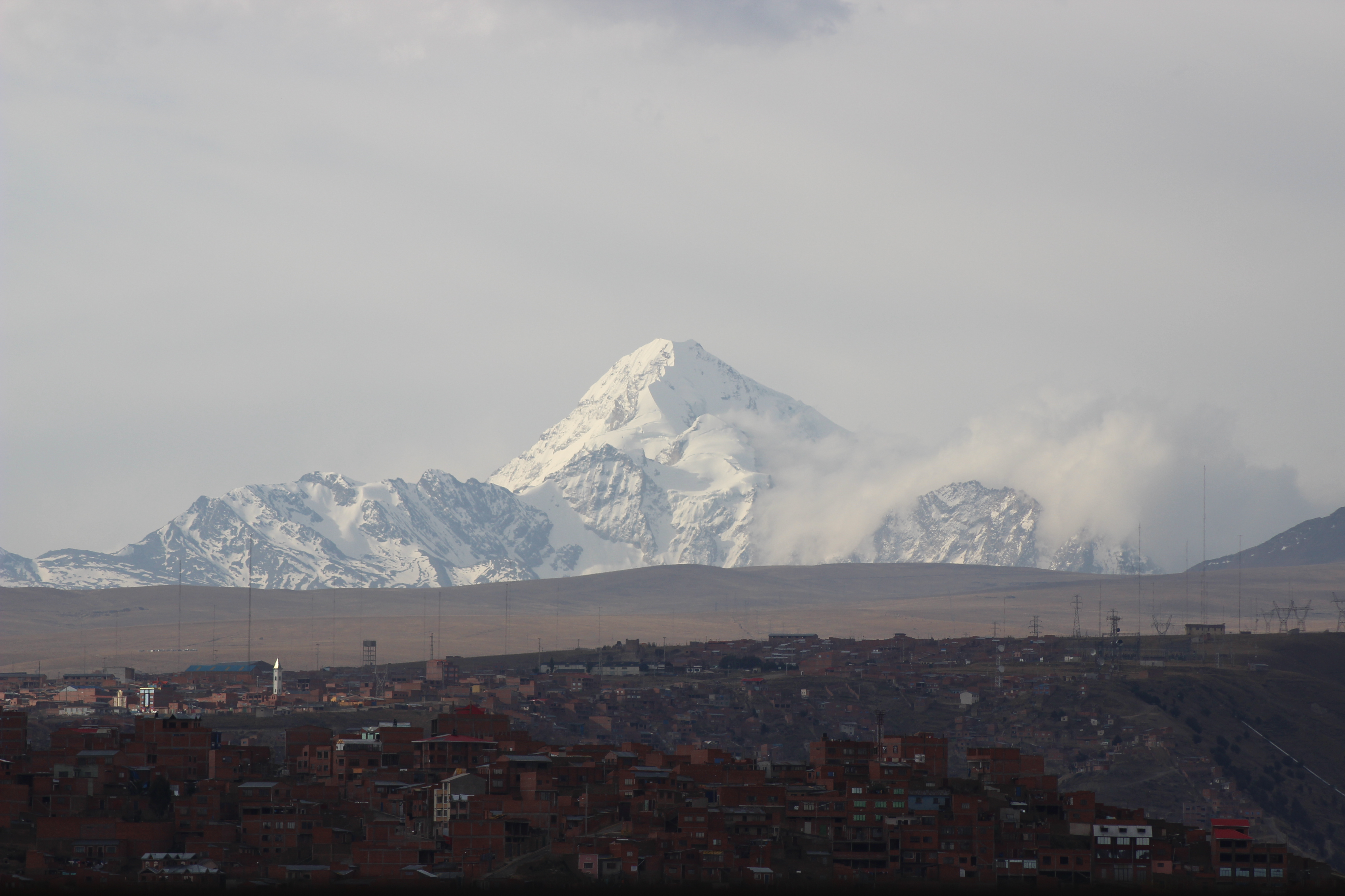 Huayna Potosí nahe La Paz